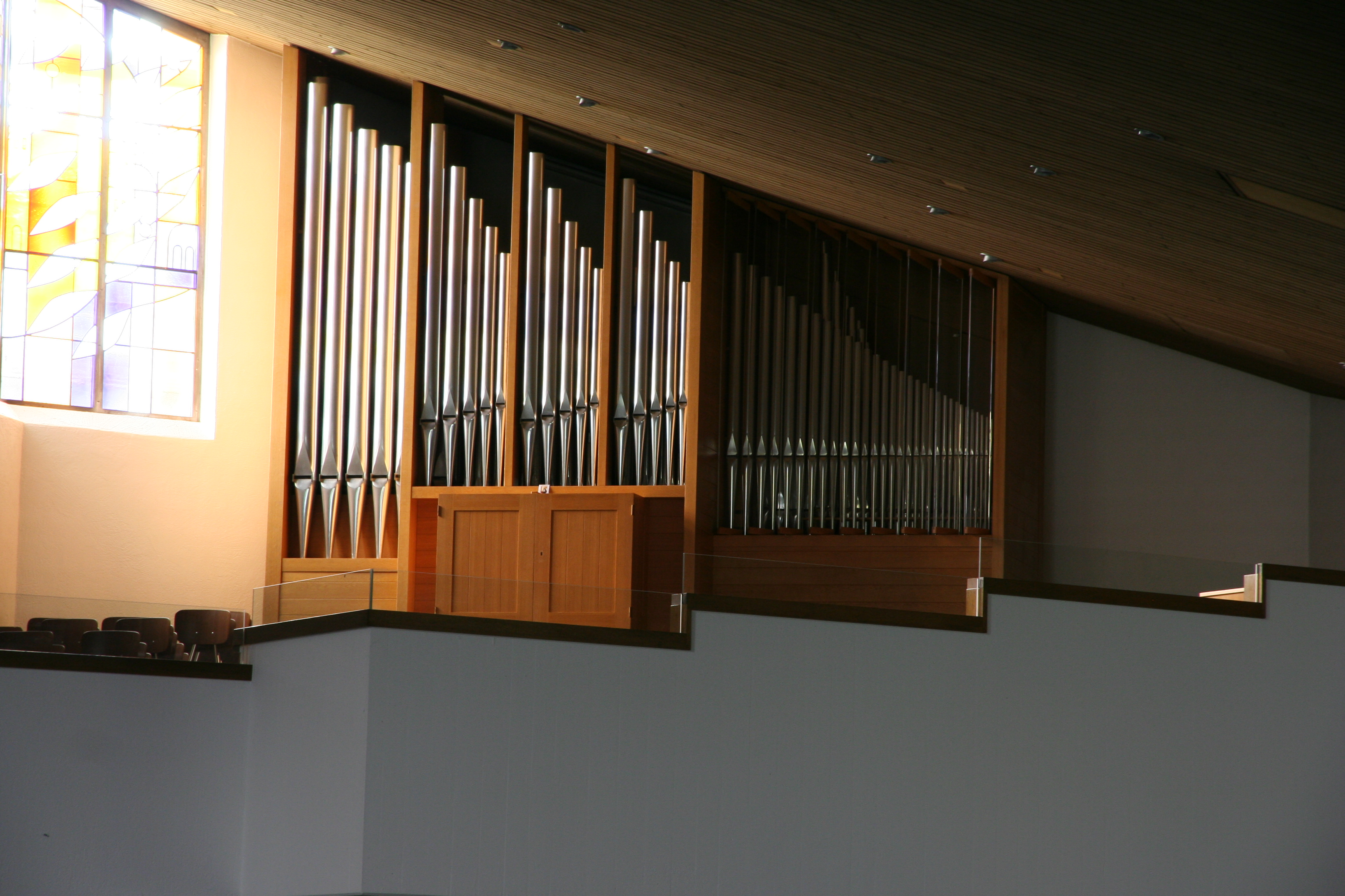 Römisch-katholische Pfarrkirche St. Joseph in Aedermannsdorf